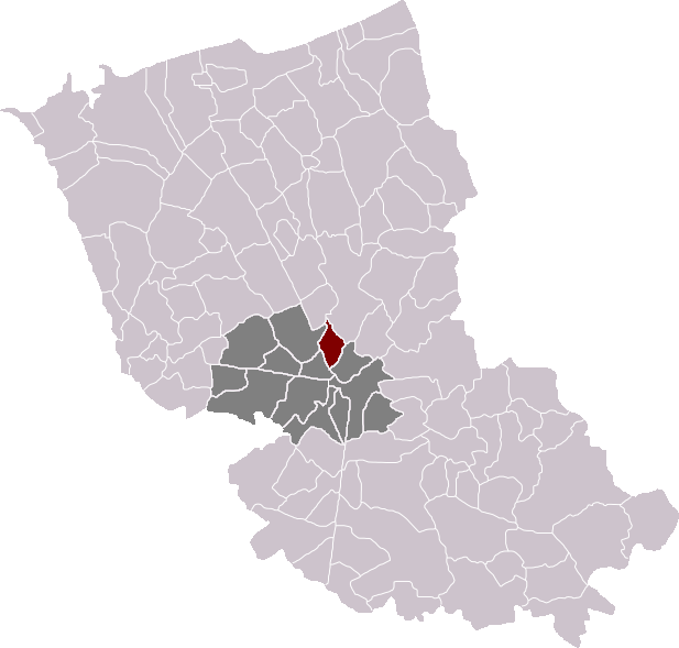 Locatie gemeente Zermezele in arrondissement Duinkerke. Zelfgemaakt. Location of Zermezeele municipality in the arrondissement of Dunkirk. Self made. Localisation de la commune de Zermezeele dans l'arrondissement de Dunkerque. Fait moi-même.